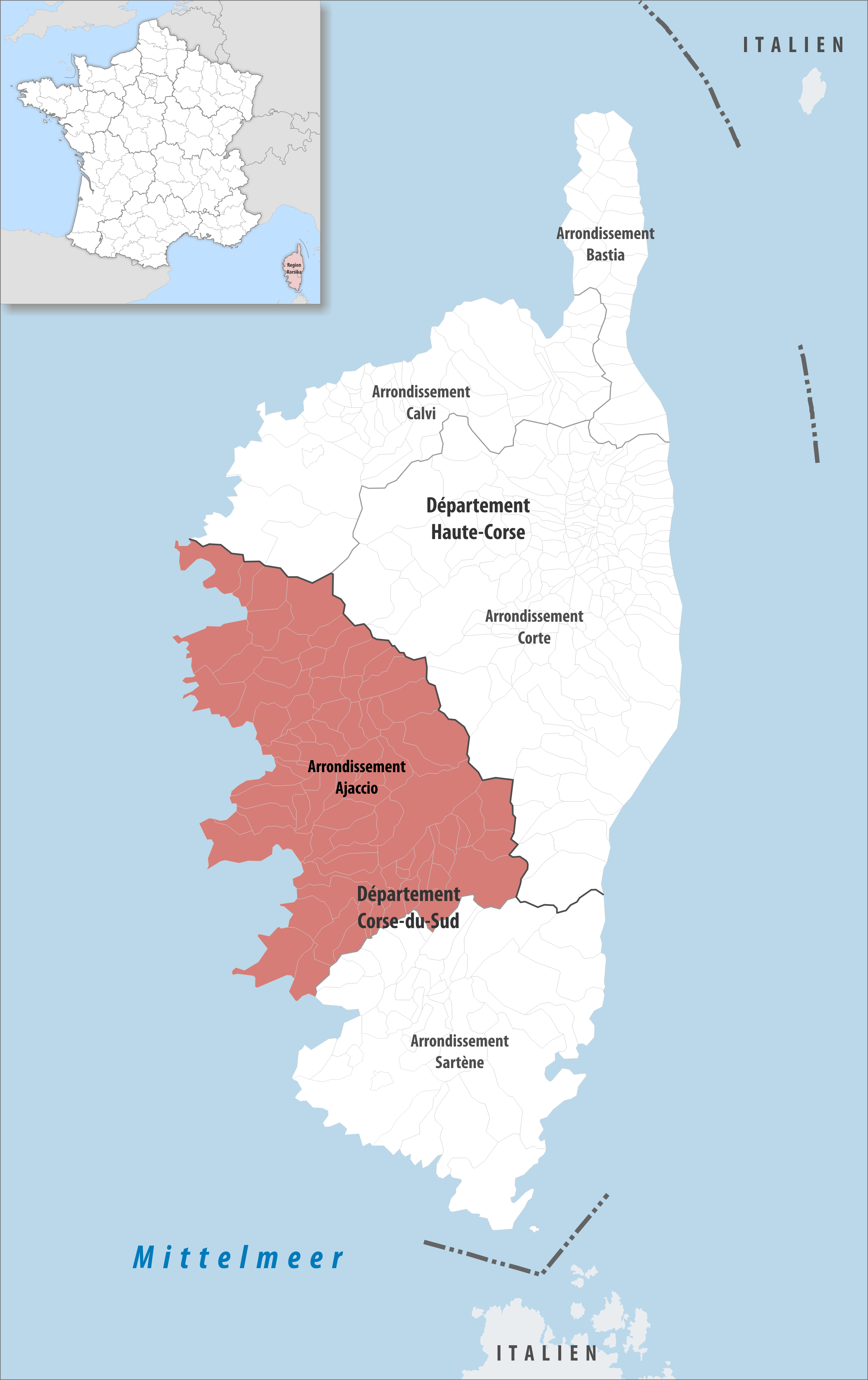 Lage des Arrondissements Ajaccio